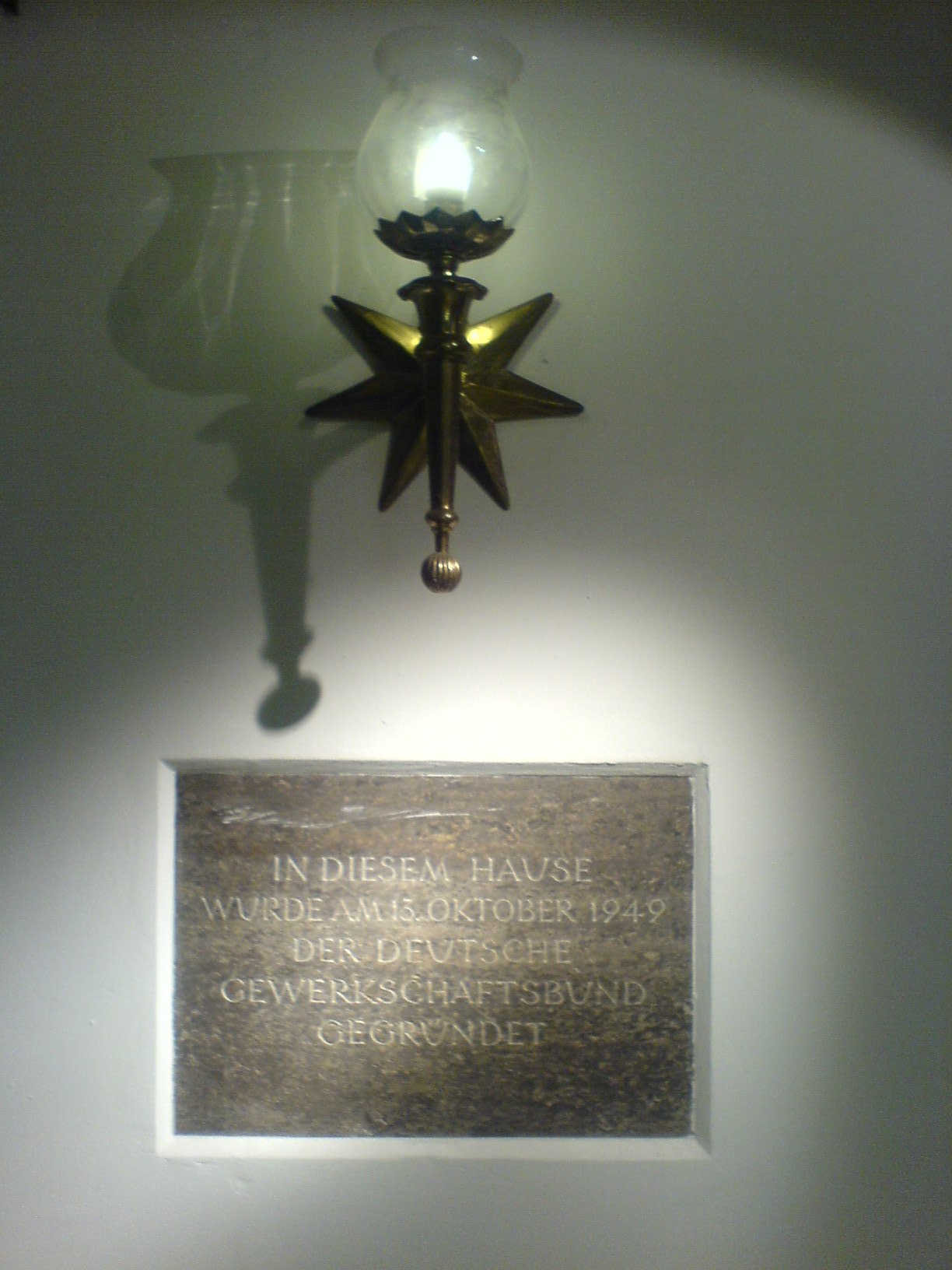 Gedenktafel anläßlich der Gründung des Deutschen Gewerkschaftsbundes im Foyer des Deutschen Museums München (Gebäudekomplex, nicht die Museumsräumlichkeiten).